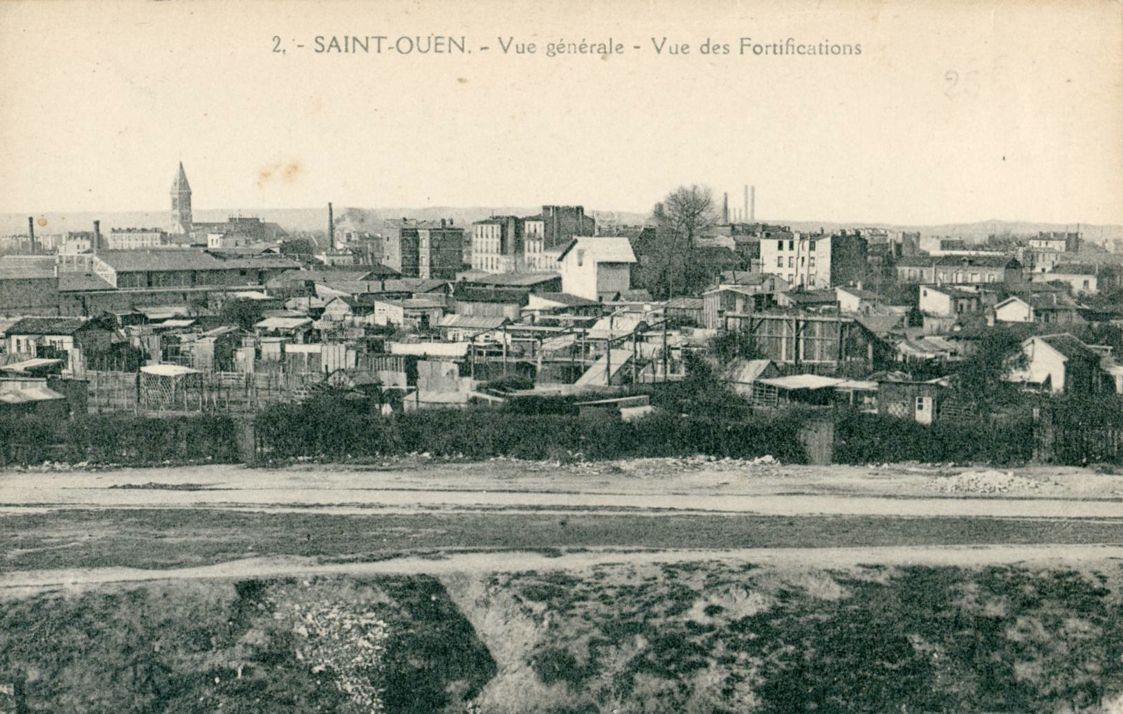 Carte postale ancienne éditée par Abeille N°2 SAINT-OUEN (93) - Vue générale - Vue des Fortifications